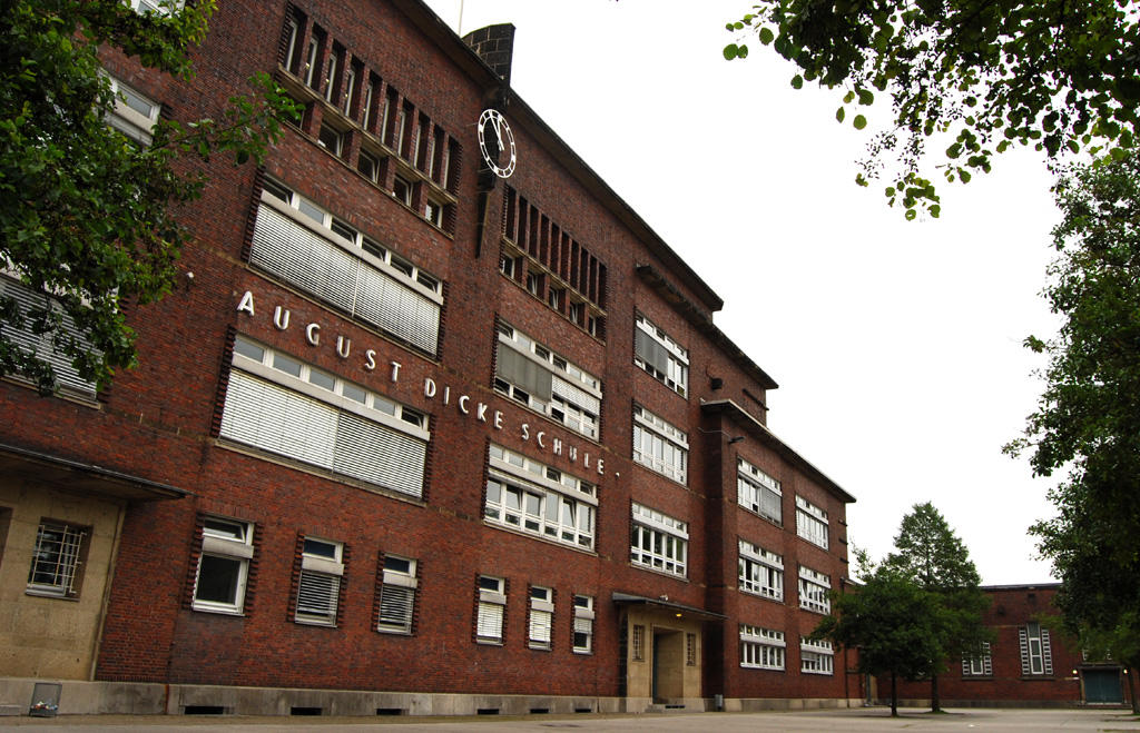 Gymnasium August-Dicke-Schule (Solingen)